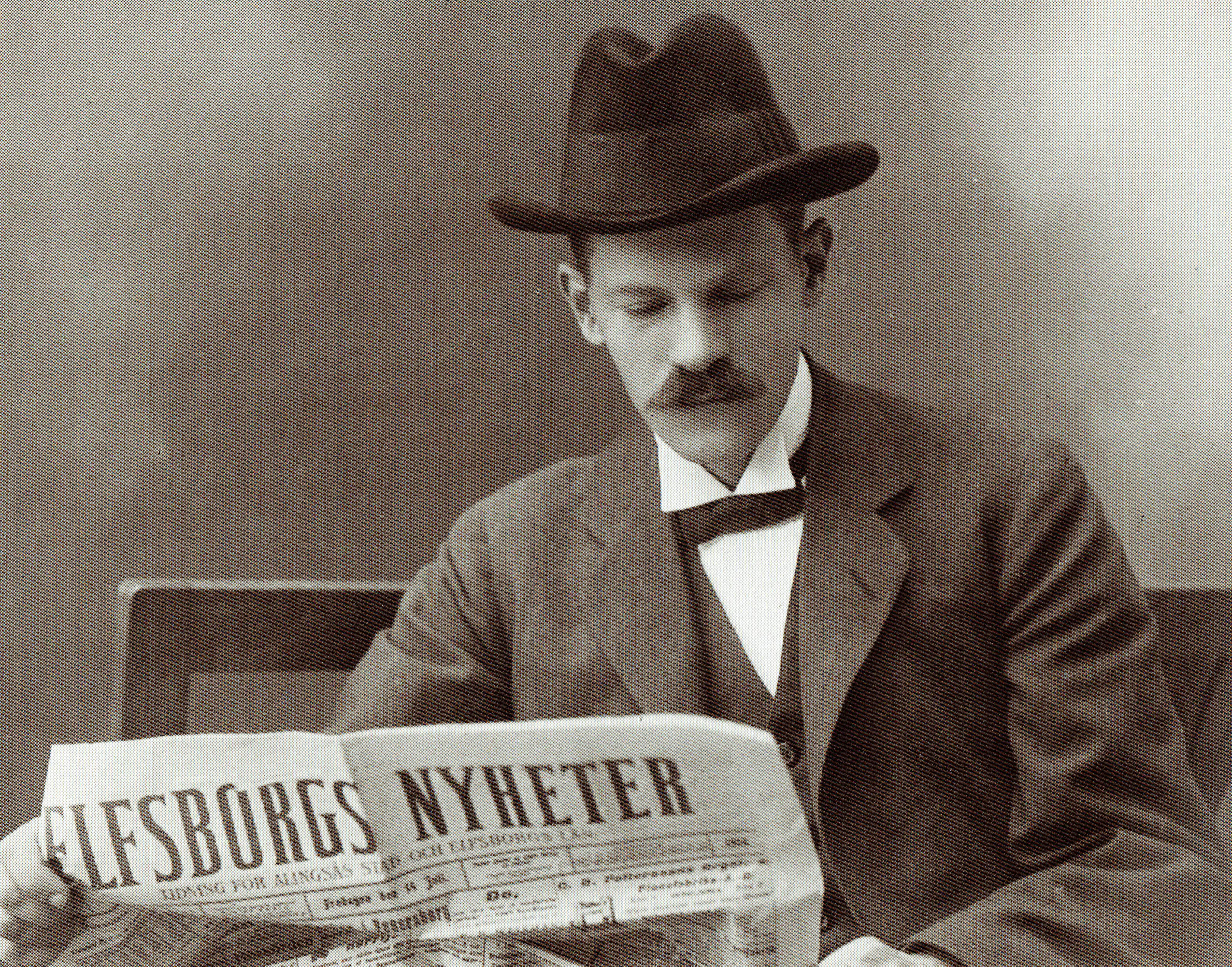 Gustaf Ewald (1884-1976)